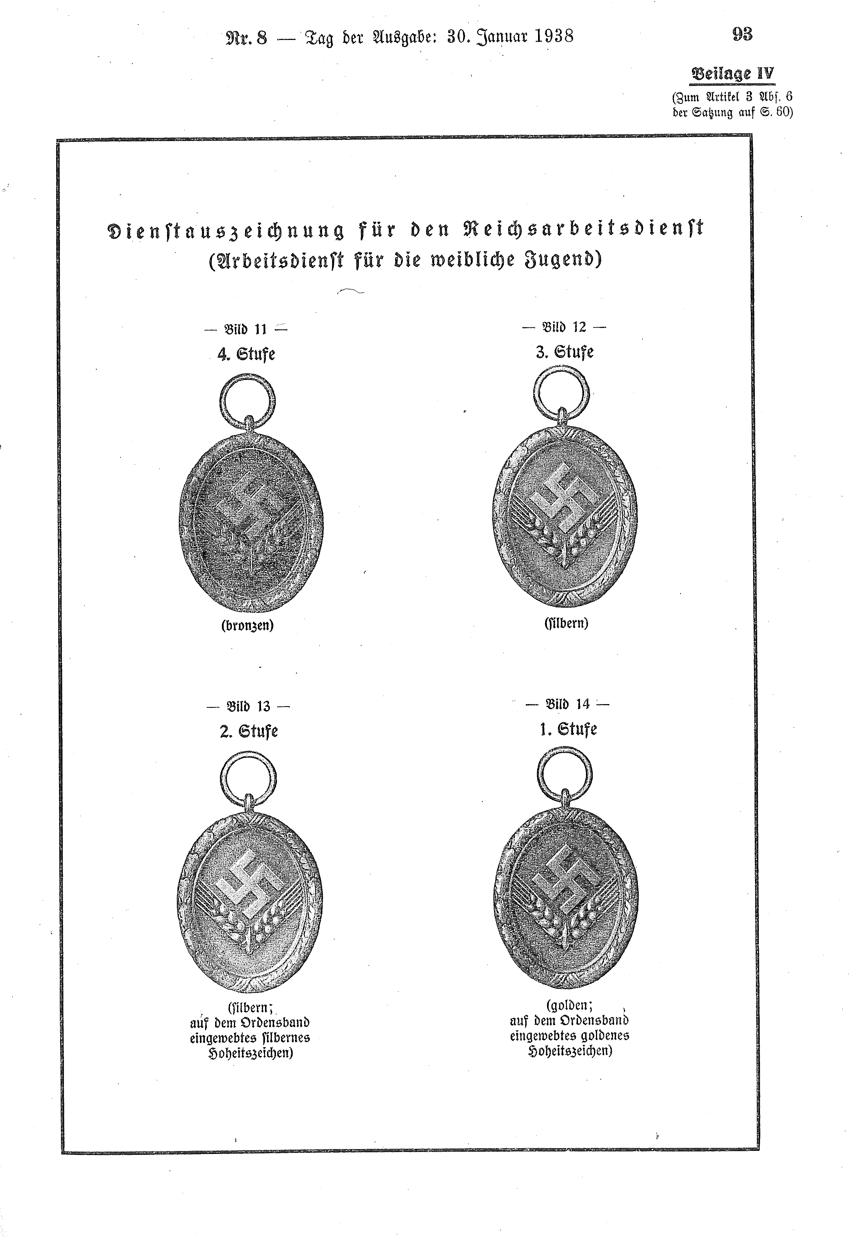 Anlagemuster der Dienstauszeichnung des Reichsarbeitsdienstes